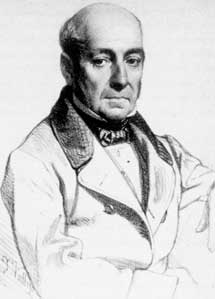 Portrait of Ramon de la Sagra